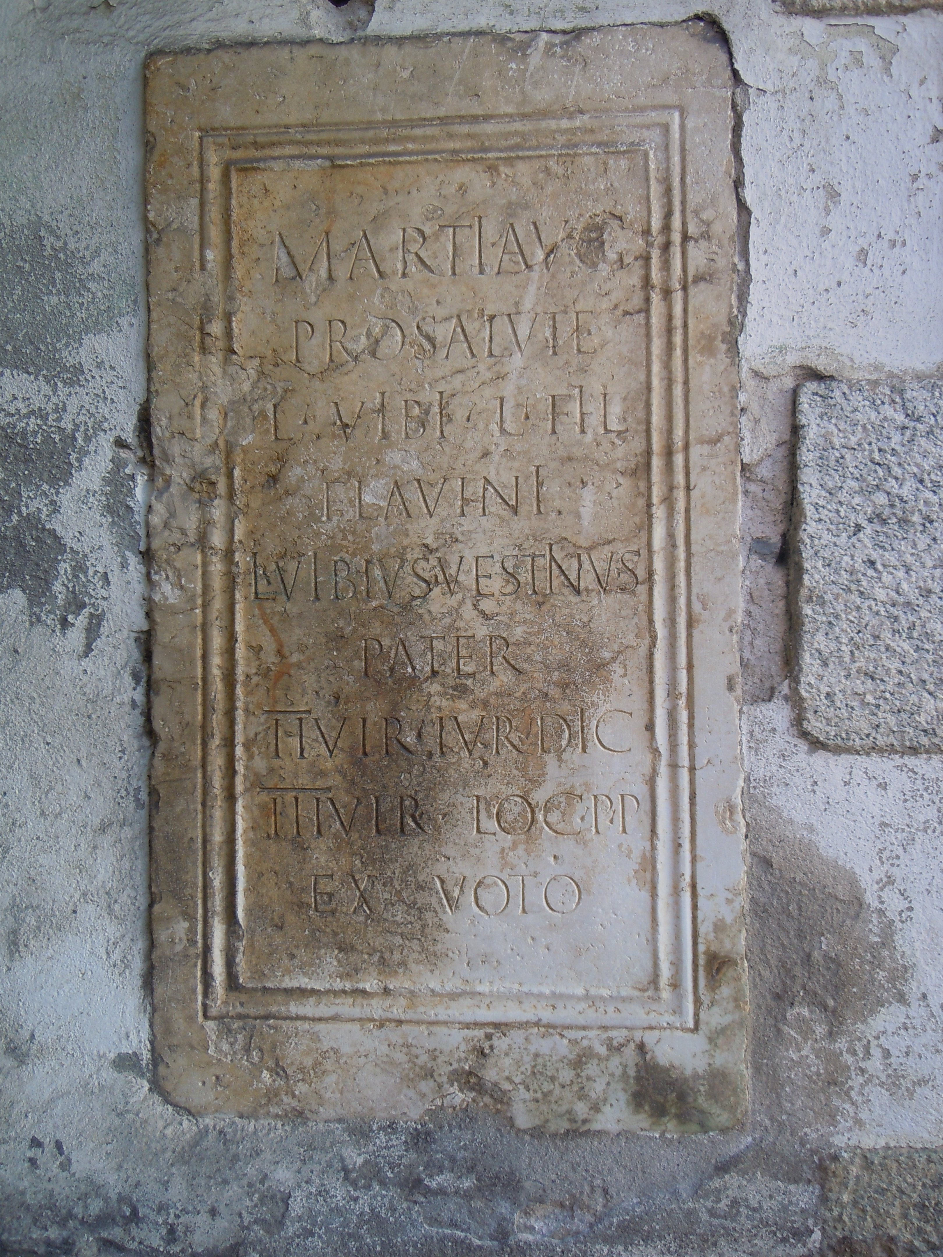 Église Saint-Pierre-et-Saint-Paul - Passy (Haute-Savoie) : Stèle Gallo-Romaine. Marti Aug(usto) / pro salute / L(uci) Vibi L(uci) fil(ii) / Flavini / L(ucius) Vibius Vestinus / pater / IIvir iur(e) dic(undo) / IIIvir loc(orum) p(ublicorum) p(ersequendorum) / ex voto. CIL XII 2350 = ILHSavoie 00080 = ILN-05-02, 00548.